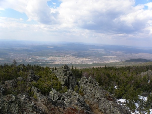 Вид на Качканар с г. Качканар